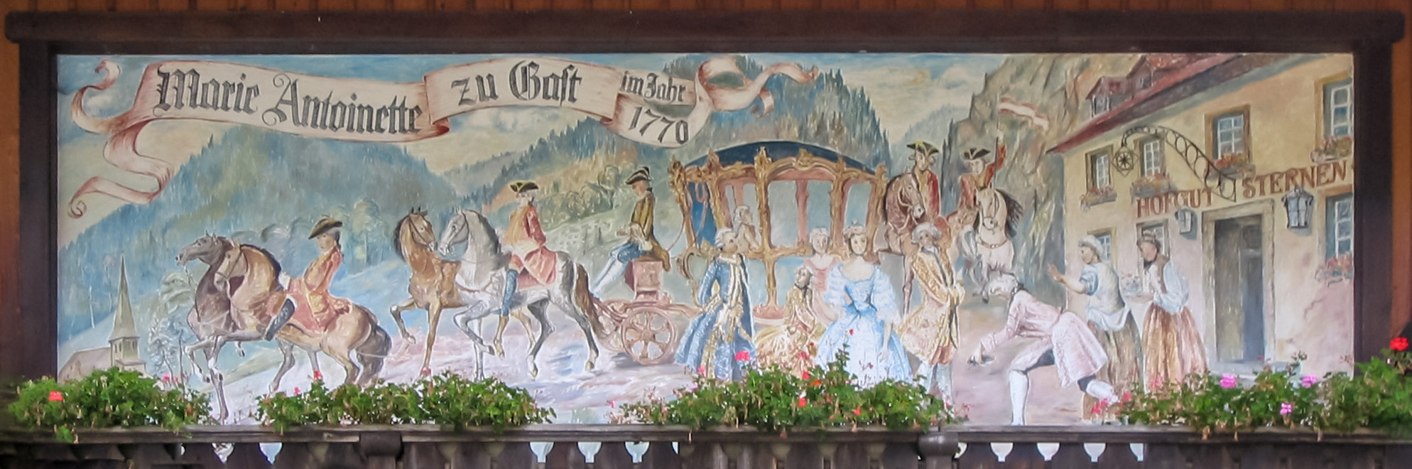 Gemälde am Hofgut Sternen, das von der Durchreise von Marie Antoinette im Jahr 1770 berichtet